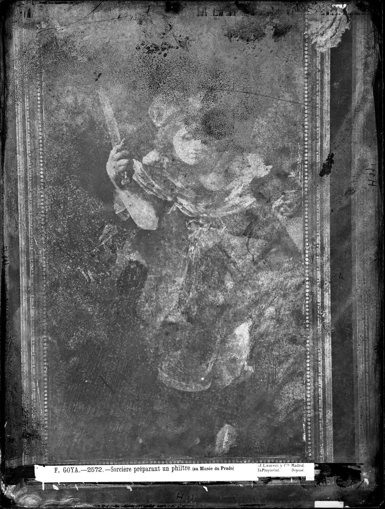 "Judith y Holofernes" es una de las Pinturas negras que formaron parte de la decoración de los muros de la casa de la Quinta de Goya. Esta pintura fue fotografiada por J. Laurent en el año 1874, junto con el resto de la serie, en el interior de la casa. Pero, el negativo de esta fotografía se ha conservado deficientemente, y los deterioros de la imagen son daños en el negativo. La pintura, en 1874, parece ser que se conservaba en buen estado. A pesar de los daños en el negativo fotográfico (aquí digitalizado y positivado), esta imagen deteriorada es el único testimonio de que esta pintura estuvo rodeada con papeles pintados en la casa de Goya. En cambio, afortunadamente, se han conservado en muy buen estado el resto de los negativos de la serie de las Pinturas Negras en 1874, según fotografías de Laurent. Esas otras fotografías bien conservadas pueden verse en los artículos correspondientes. Por ejemplo, ver "El aquelarre (1823)", que fue fotografiado por Laurent en dos negativos, debido a su tamaño original superior a cinco metros. Los 15 negativos de las Pinturas Negras en la Quinta de Goya se conservan en el "Archivo Ruiz Vernacci", de la Fototeca del IPCE (Instituto del Patrimonio Cultural de España). Son negativos de vidrio al colodión, del formato 27 x 36 centímetros.